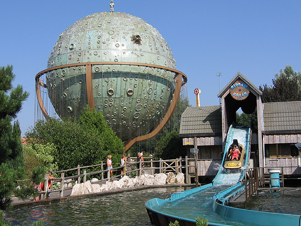 Wasserbahn und Apollo